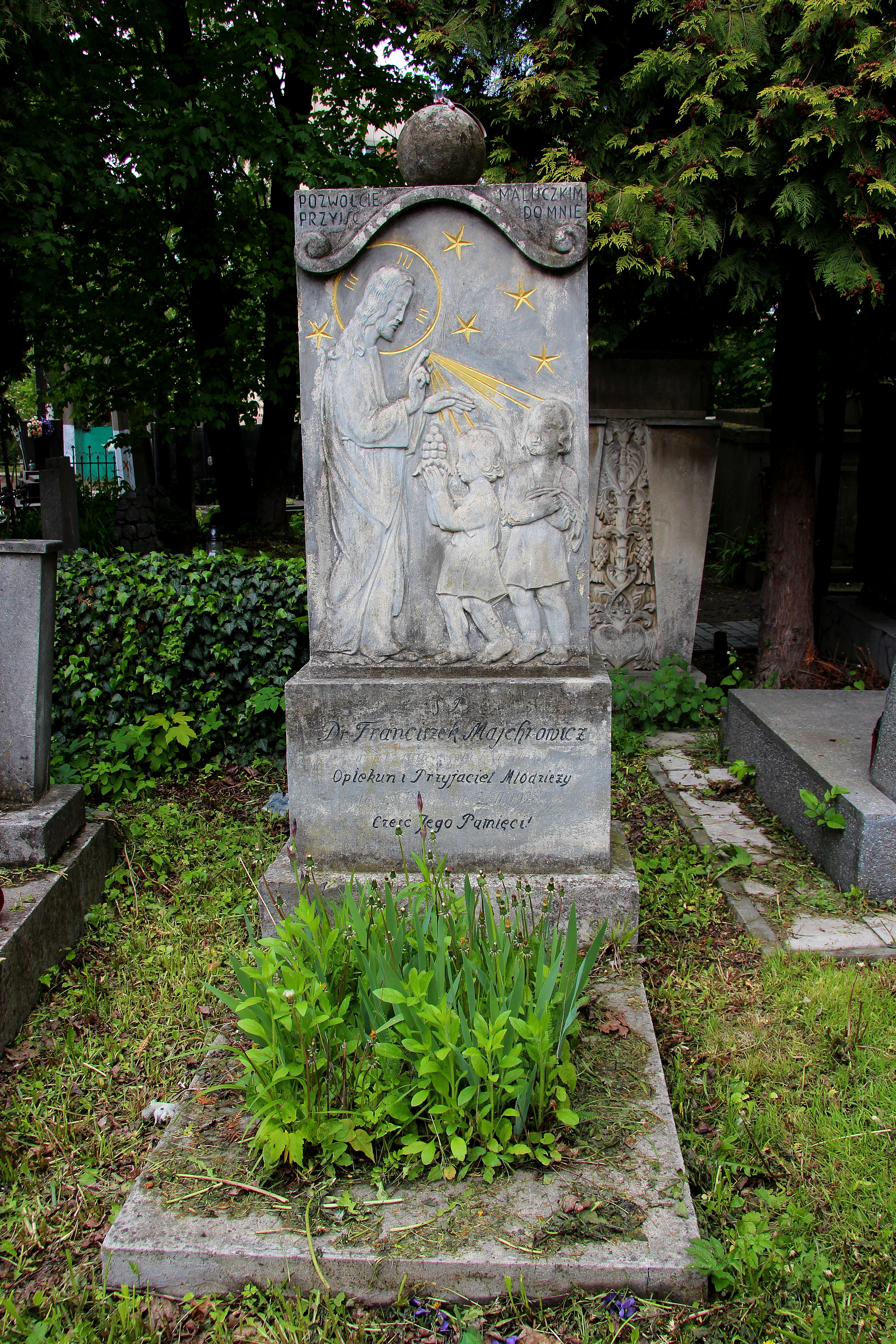 Могила Ф. Майхровича.Личаківський цвинтар , поле № 1.